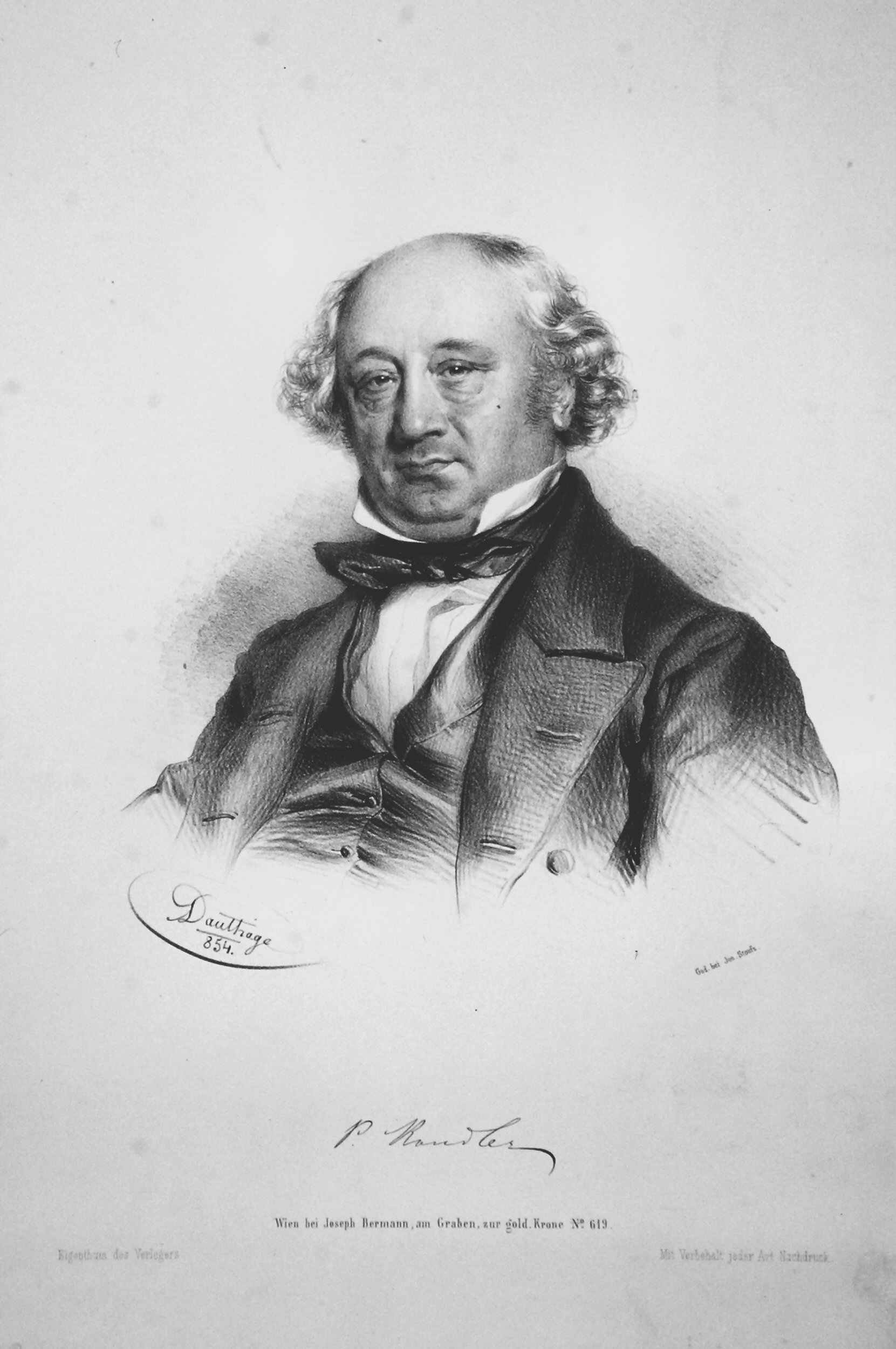 Peter (Pietro) Kandler, Lithographie von Adolf Dauthage, 1854